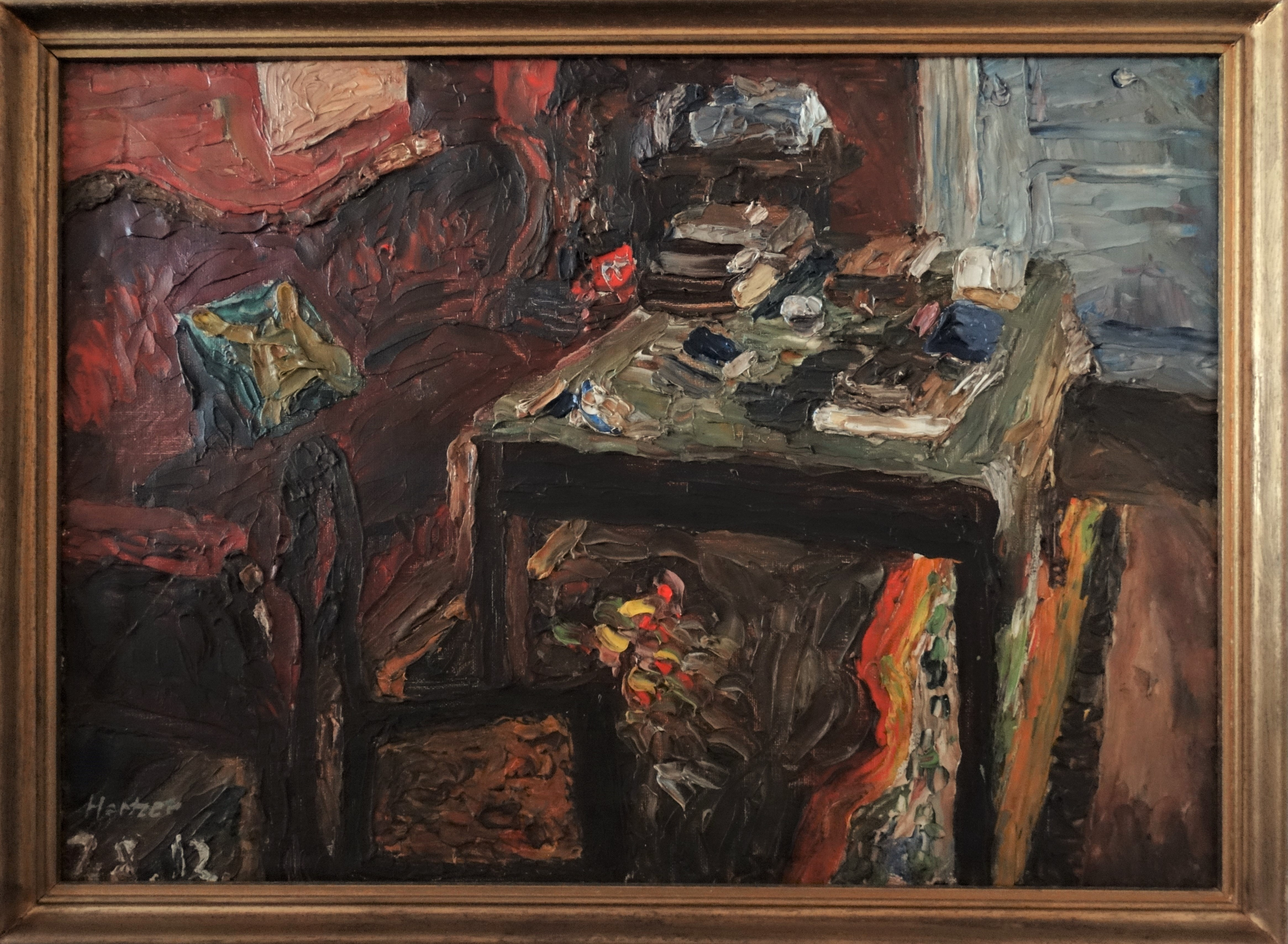 In Buttstädt entstandenes Ölbild Interieur mit Büchertisch, 1912